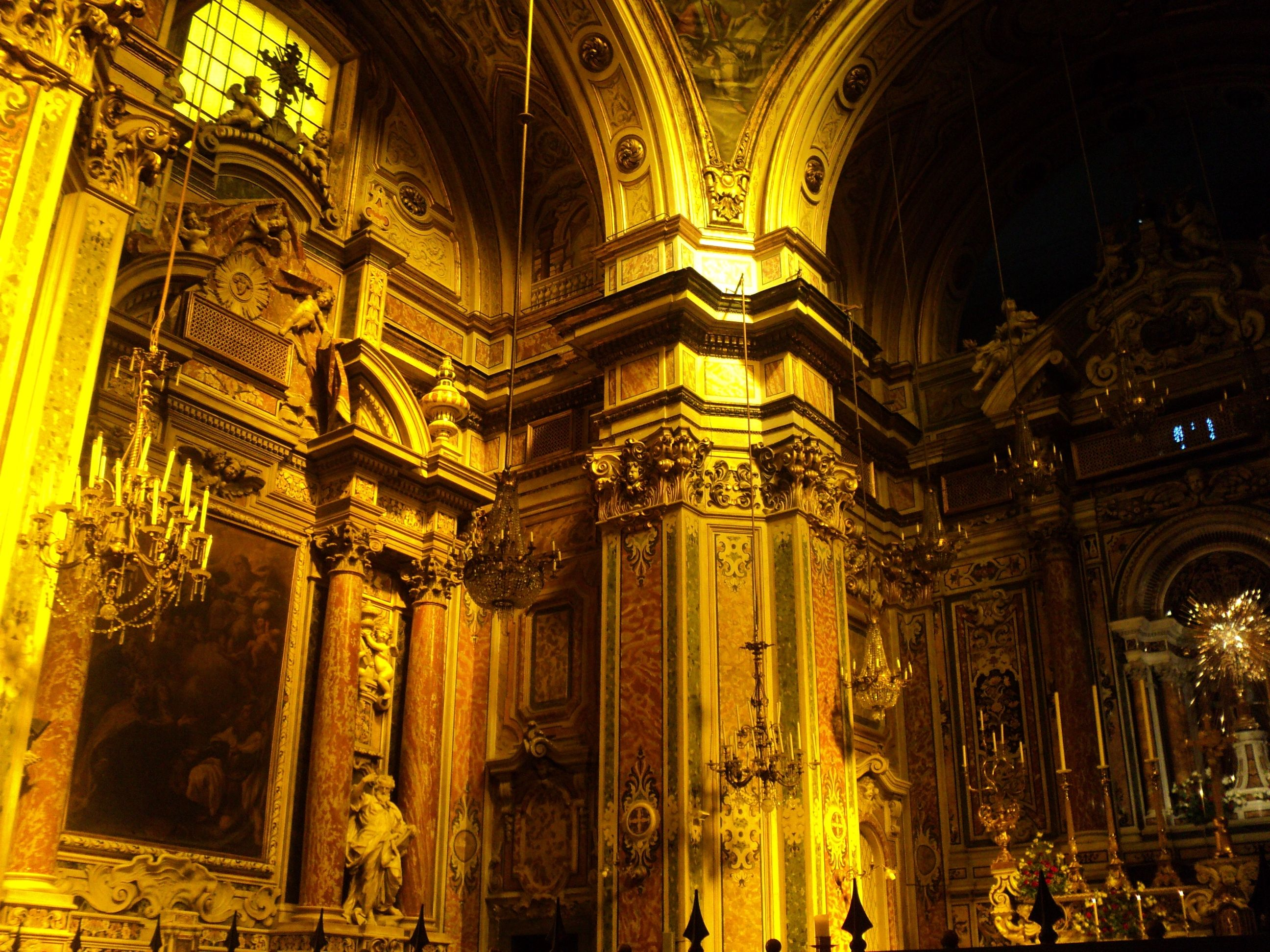 Chiesa di San Giuseppe dei Ruffi (Napoli)